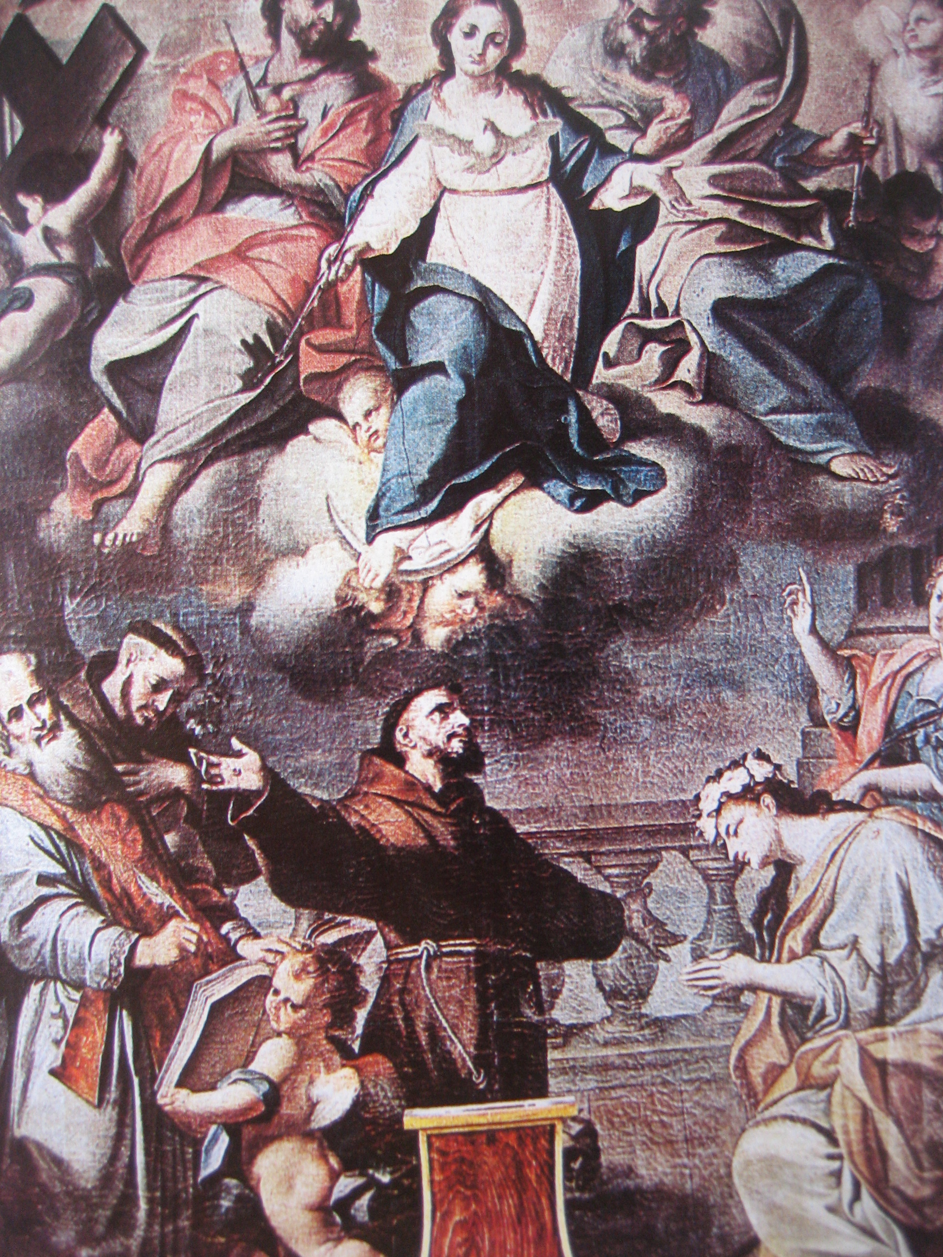 Trionfo dell'Immaculata